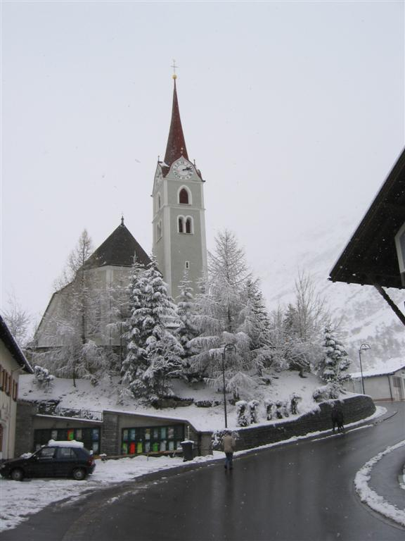 Eigen foto; gemaakt in de winter van 2002